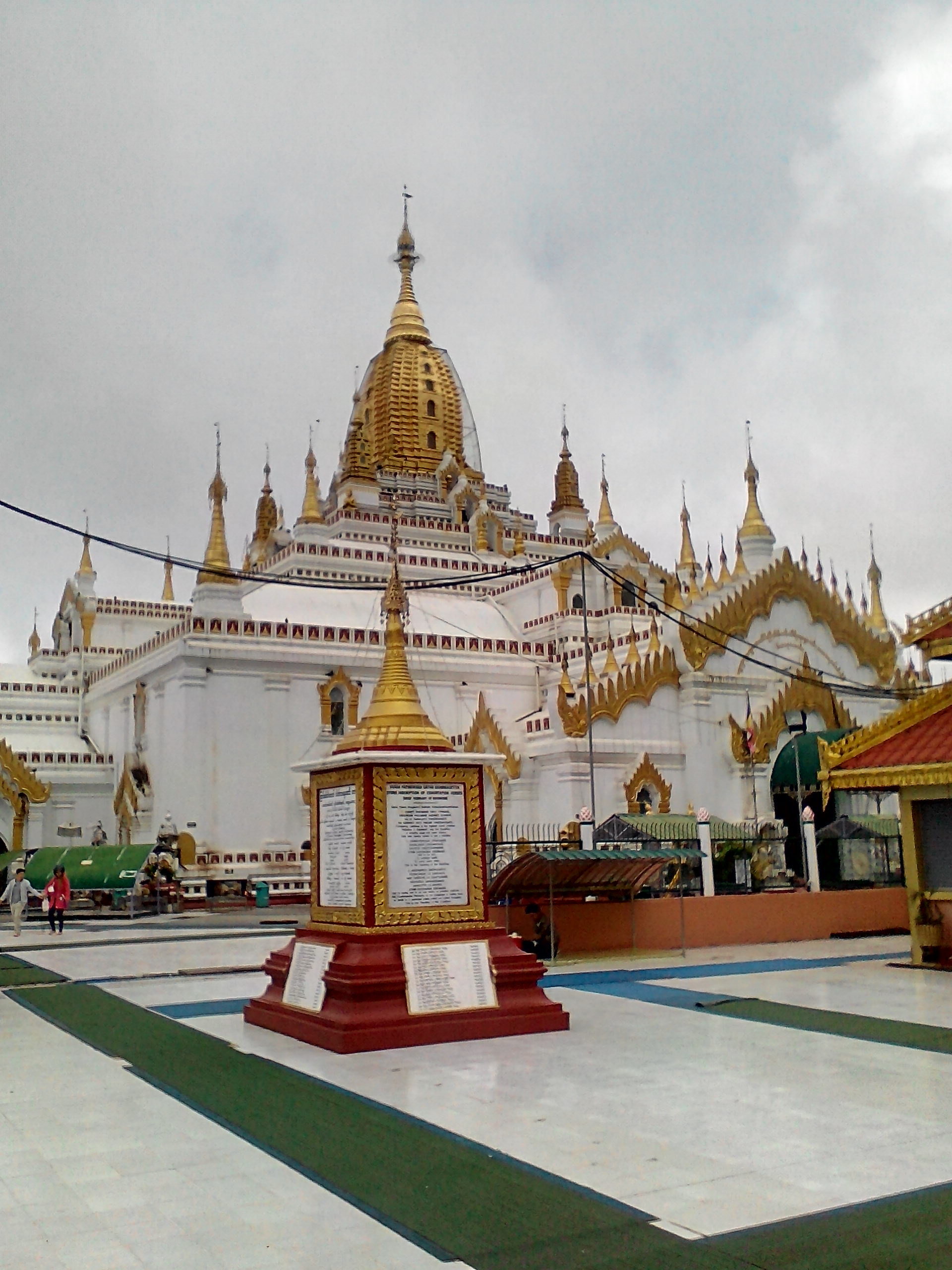 Мьянма. Таунджи. Суламуні пагода